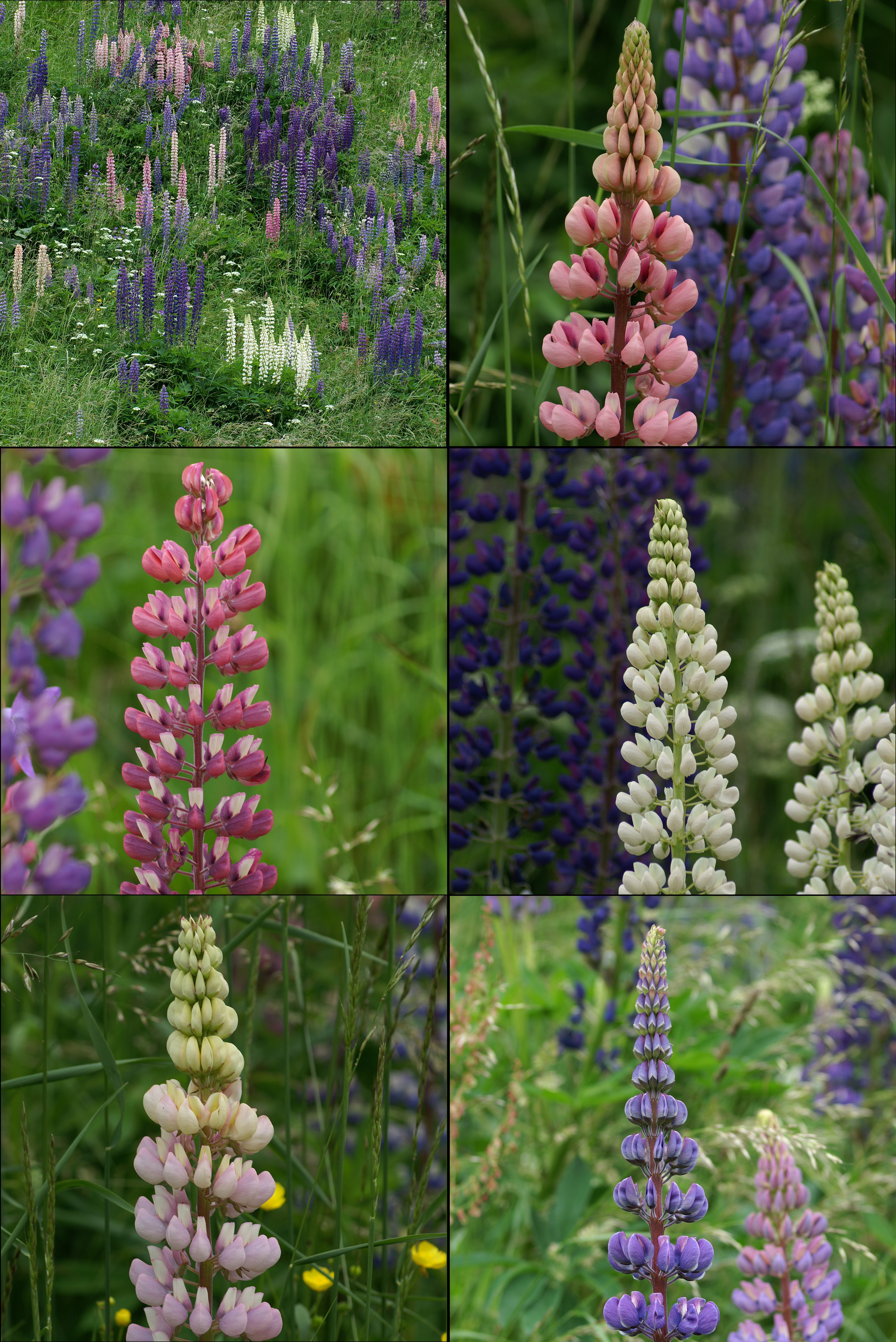 Die Vielblättrige Lupine (Lupinus polyphyllus), auch Stauden-Lupine genannt, ist eine Pflanzenart aus der Gattung der Lupinen (Lupinus), die zur Unterfamilie der Schmetterlingsblütler (Faboideae) innerhalb der Familie Hülsenfrüchtler (Fabaceae) gehört. Gesehen in Partenen , Vorarlberg